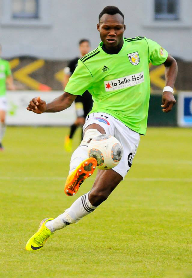 Désiré Sègbè Azankpo est né le 6 Mai 1993 au Bénin. Du haut de ses 21 ans, il est international béninois depuis le 17 Mai 2014. Ses prouesses techniques, ses conduites de balle, sa puissant athlétique, sa lourde frappe, sa pointe de vitesse phénoménale et ses passements de jambes hors pairs ont poussés le sélectionneur des Ecureuils du Bénin a lui confié la pointe de l’attaque de l’équipe nationale du Bénin.